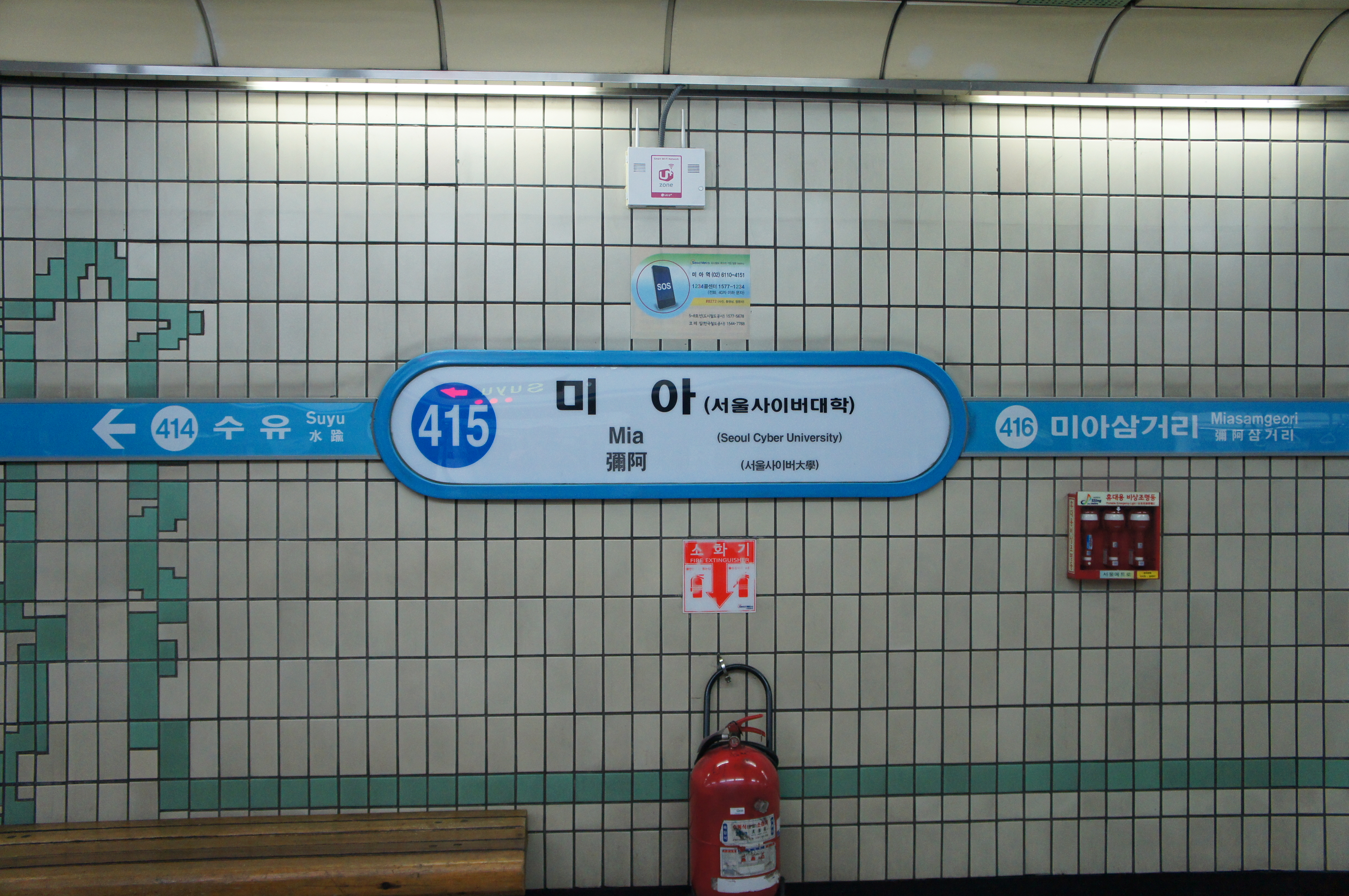 미야역 역명판